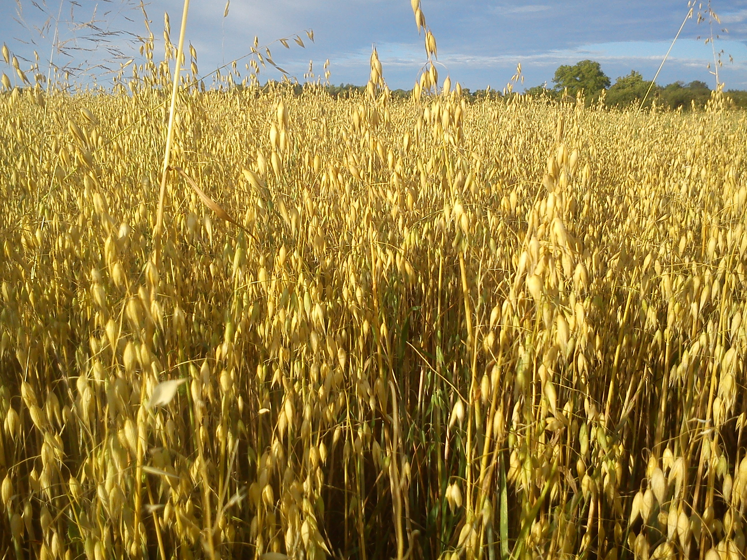 Owies na Morasku w Poznaniu.